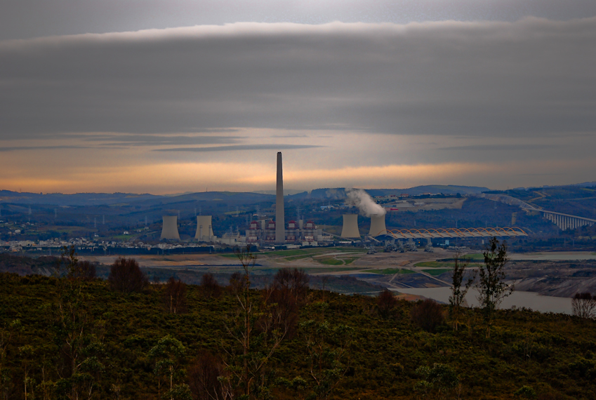 Central térmica As Pontes de García Rodríguez, Galicia (Spain)